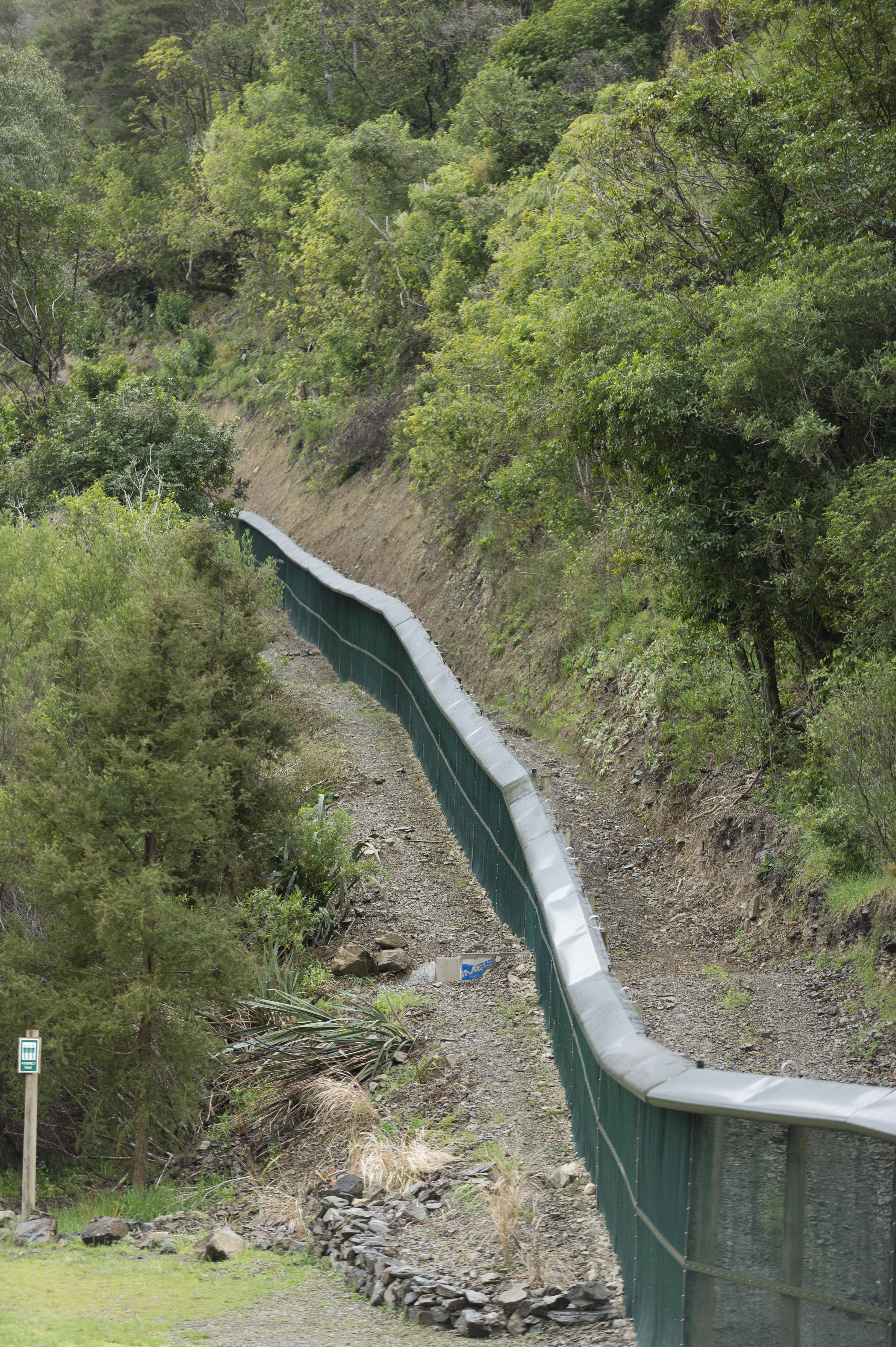 Brook Waimarama Sanctuary